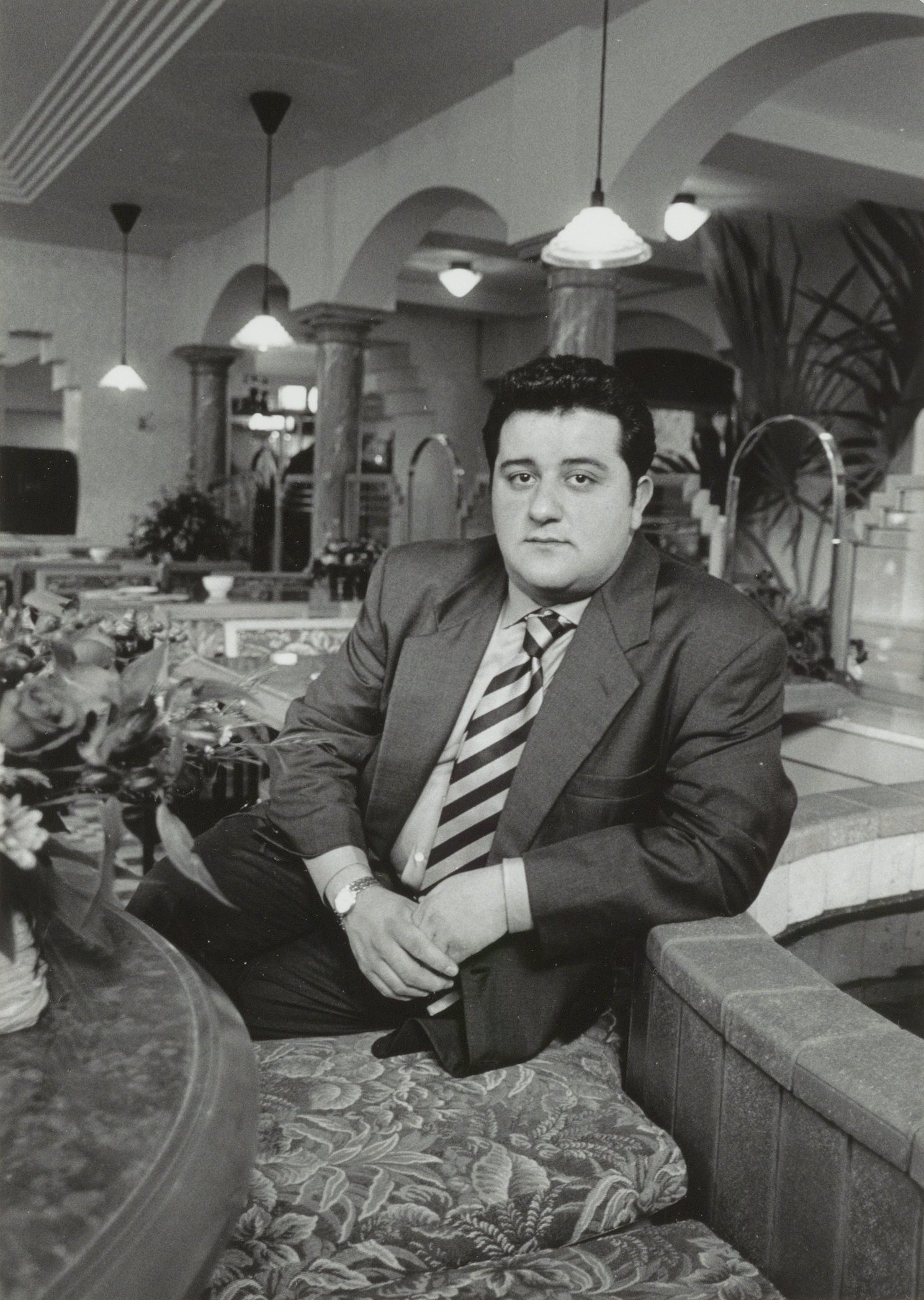 CollectieCollectie Fotoburo de BoerInventarisnummerNL-HlmNHA_54035048NL-HlmNHA_1478_39589KBeschrijvingMino Raiola, de eigenaar van Grand Café Doria.FotonummerNL-HlmNHA_1478_2673DocumenttypePortrettenVervaardigerPichel, Ron (UP de Boer) Soort vervaardigerFotograaf AnnotatiesHD230494LandNederland ProvincieNoord-Holland GemeenteHaarlem PlaatsHaarlem StraatGrote Markt GeografischCentrum Begindatum04-1994Einddatum04-1994TechniekFoto Trefwoordenhoreca